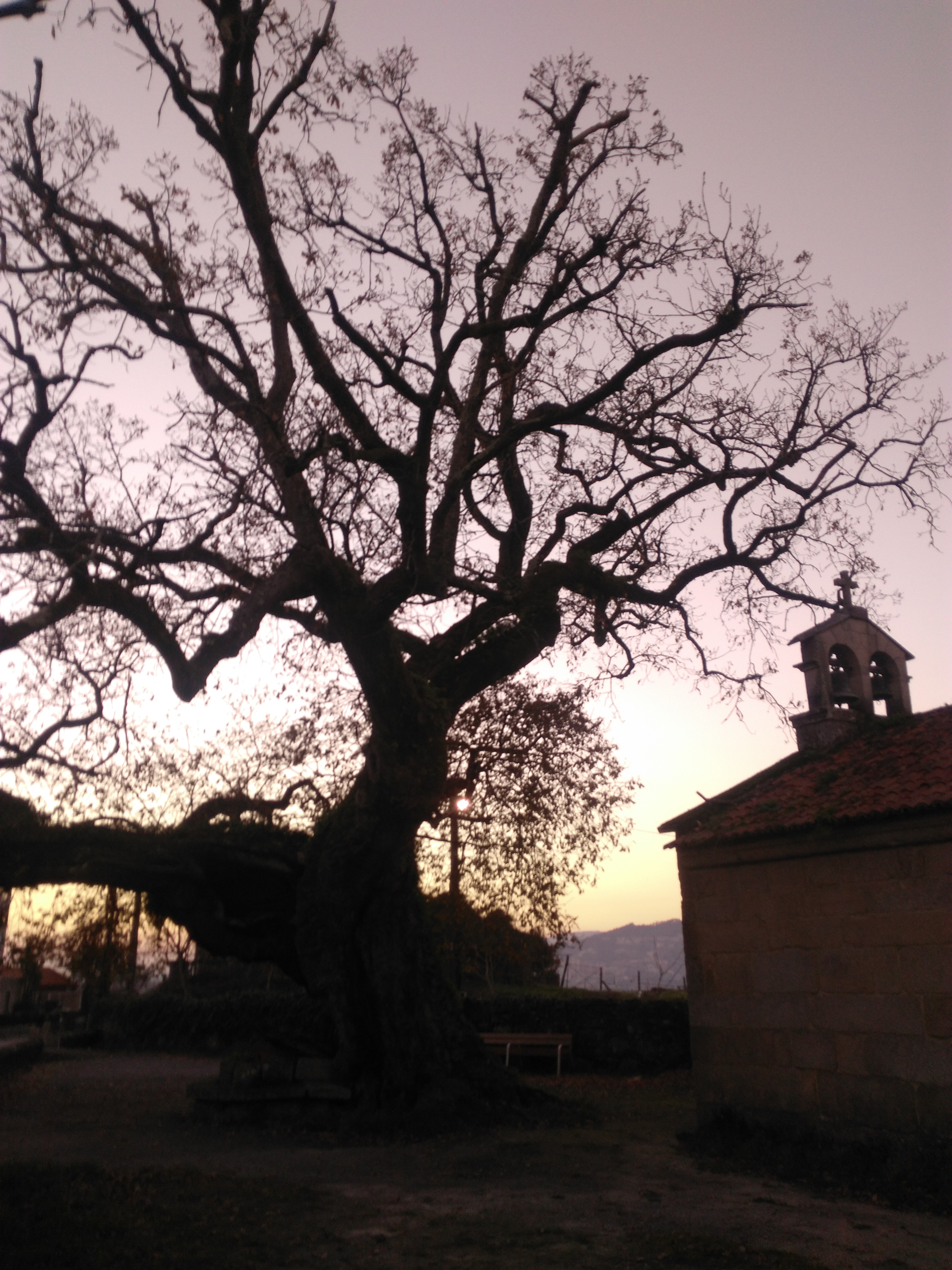 Roble centenario situado en el recinto de la ermita románica de Santa Margarita (Mourente, Pontevedra). Sus medidas varían según las fuentes. Tanto el roble como la ermita han sido citados en diferentes textos e incluso han llegado a ser el tema de alguna monografía [1]. El roble es un emblema en el vecindario, cuyos miembros no cejan en su empeño por procurar que se le dediquen los máximos cuidados y se extreme su protección para prolongar su longeva existencia.